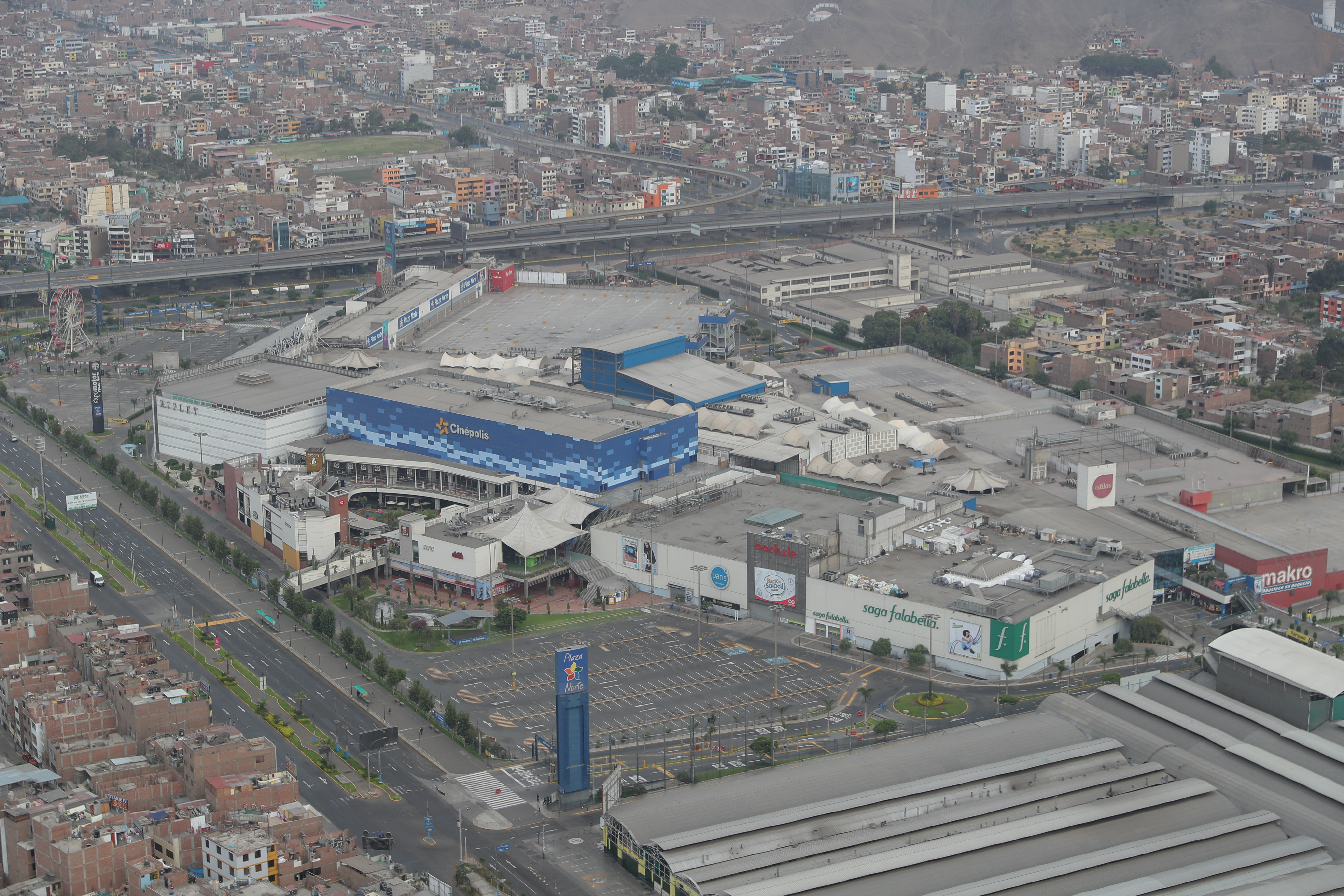 Plaza Norte de Lima